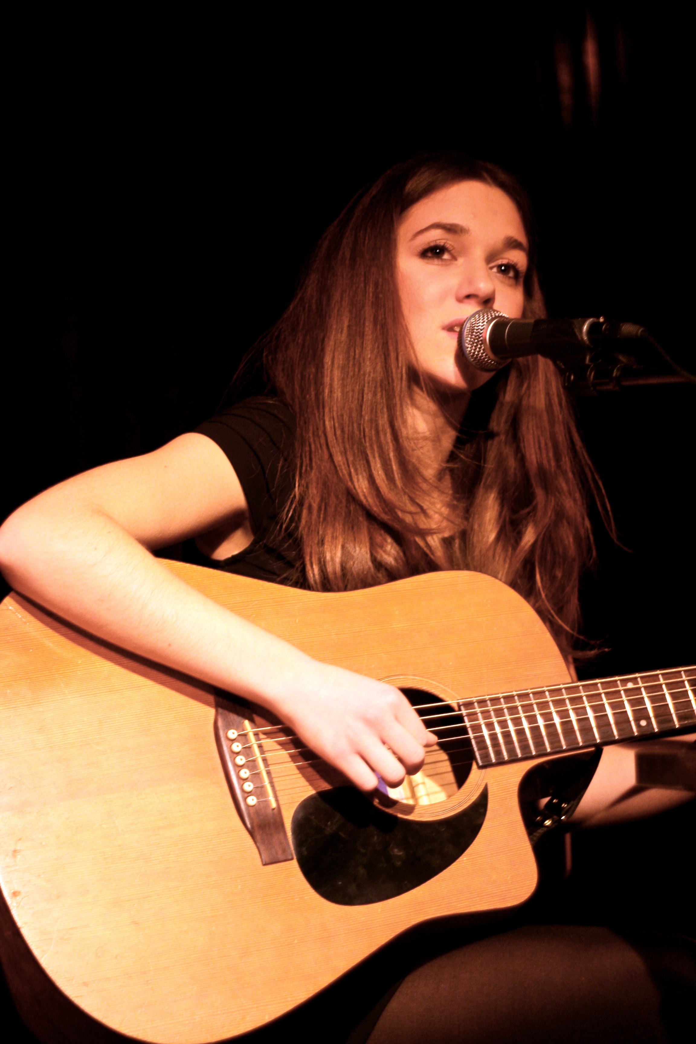 Melissa Horn på Nefertiti den 4:e december.